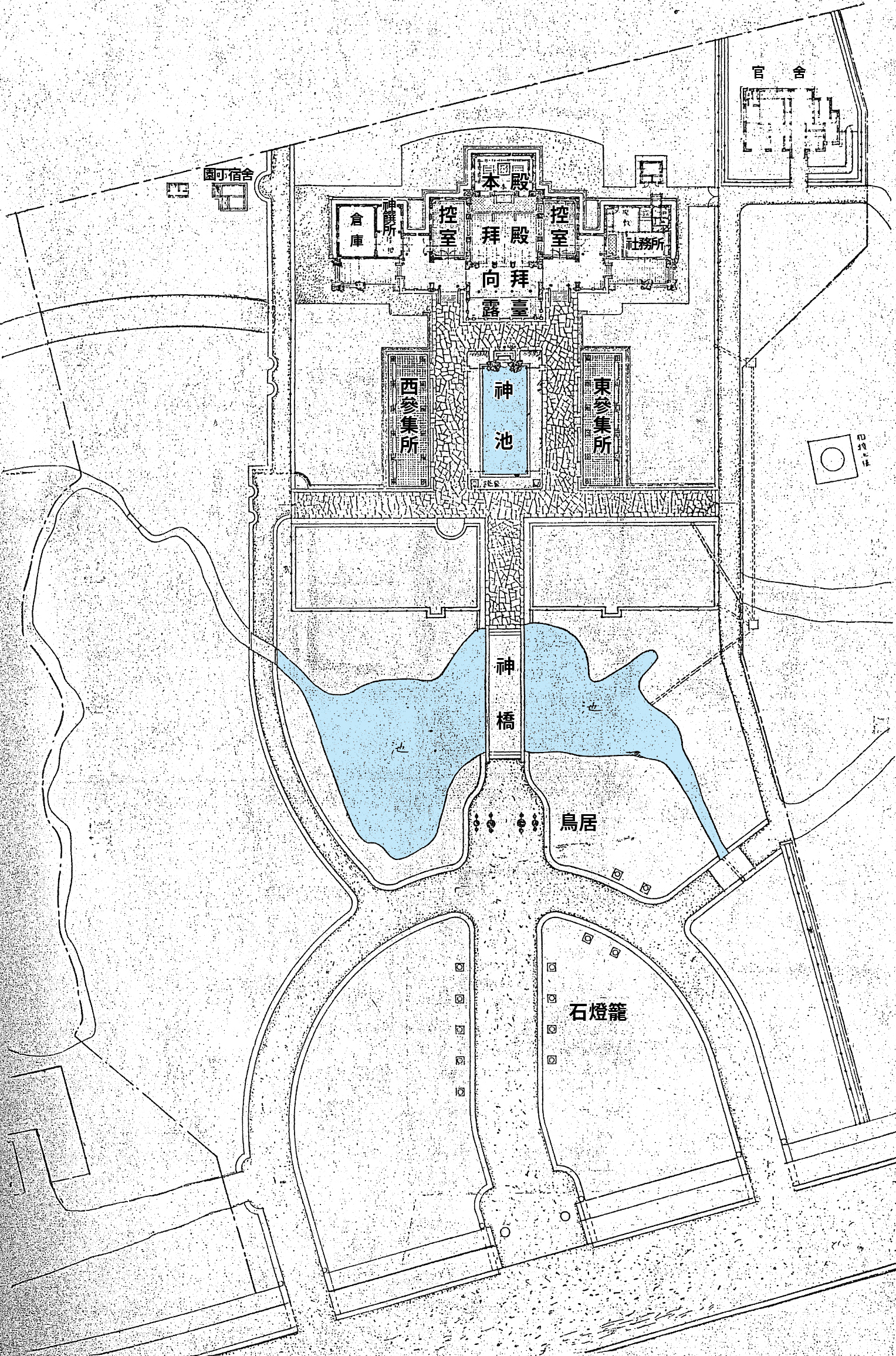 中文（台灣）: 臺灣日治時期台北市的建功神社平面圖，設立於1928年，現址為臺灣藝術教育館南海書院。